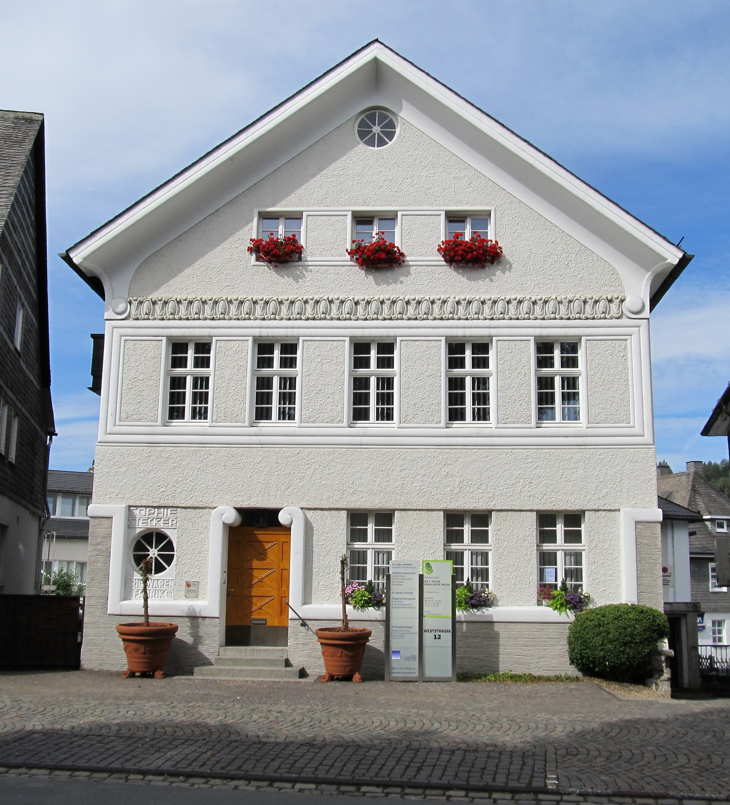 Schmallenberg, Weststraße 12, Fachgiebelhaus Sophie Stecker StrickwarenfabrikThis is a photograph of an architectural monument., no. 90